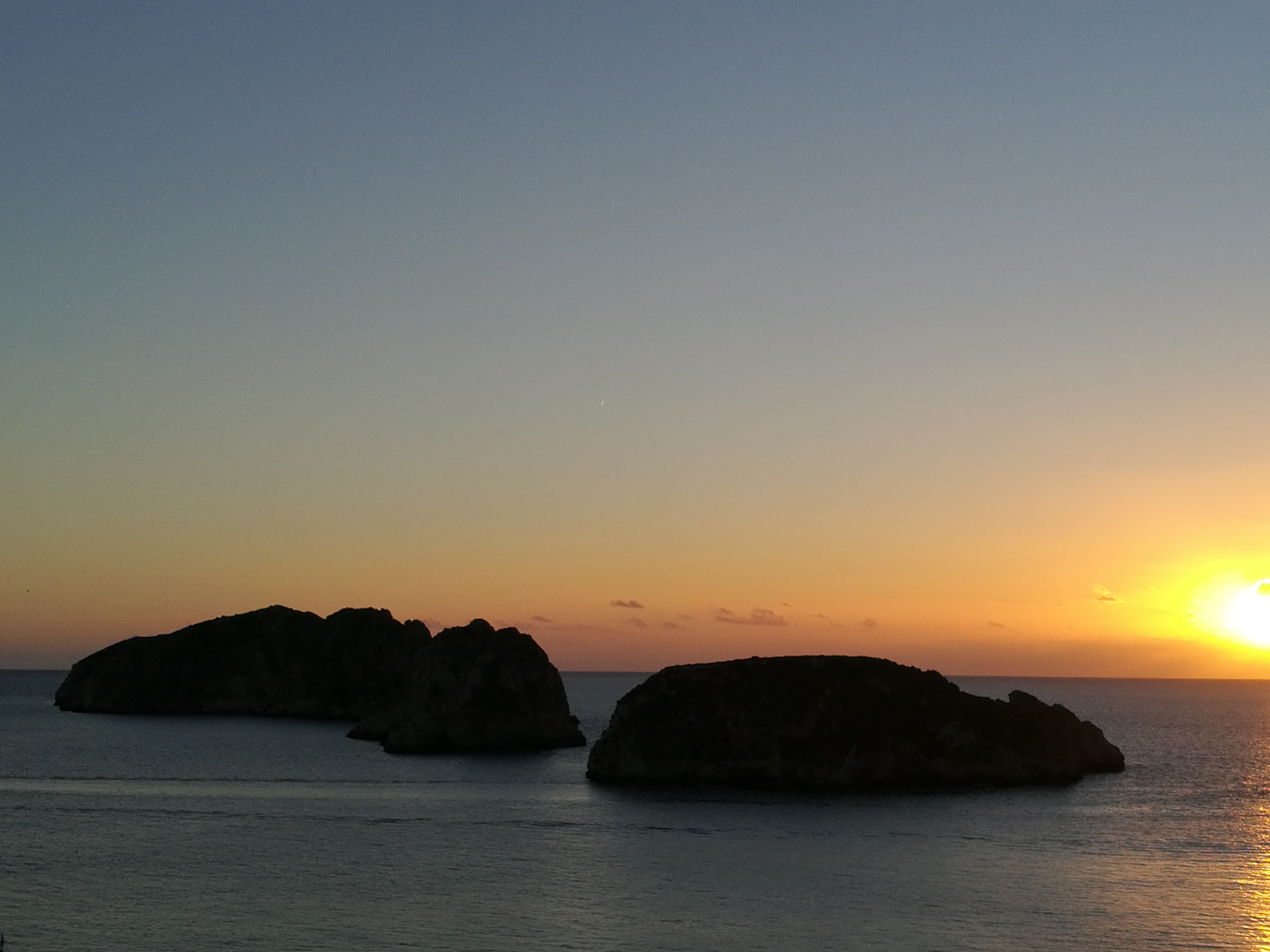 Les îles Malgrats au coucher du soleil, septembre 2018, Mayorque, aux Baléares.